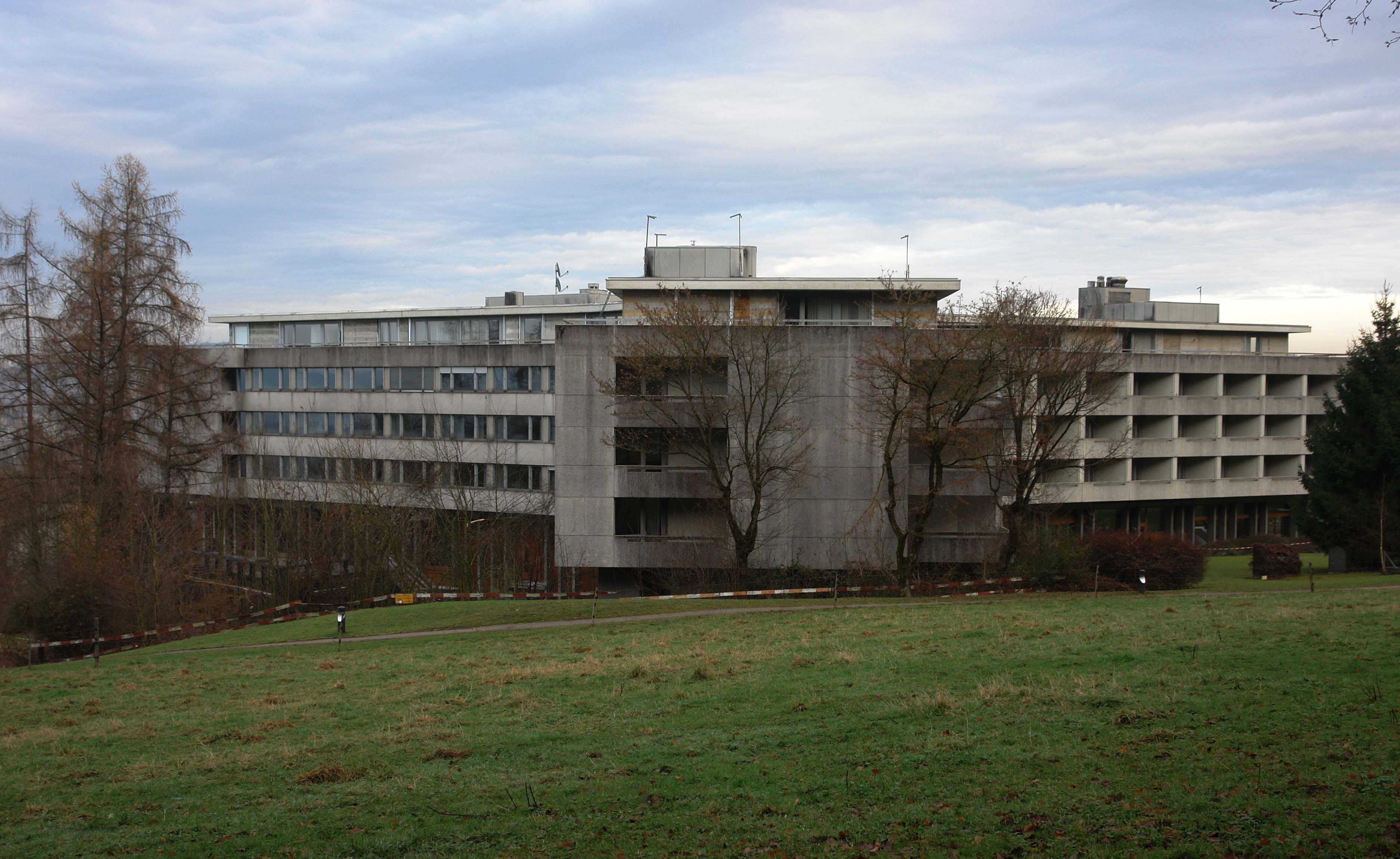 Hotel Atlantis, Zürich. Architekten: Hans und Annemarie Hubacher, Baujahr: 1970